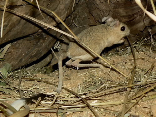 Малый тушканчик (Allactaga elater ), Пльзенский зоопарк (Zoological and Botanical Garden Plzen), февраль 2011 года